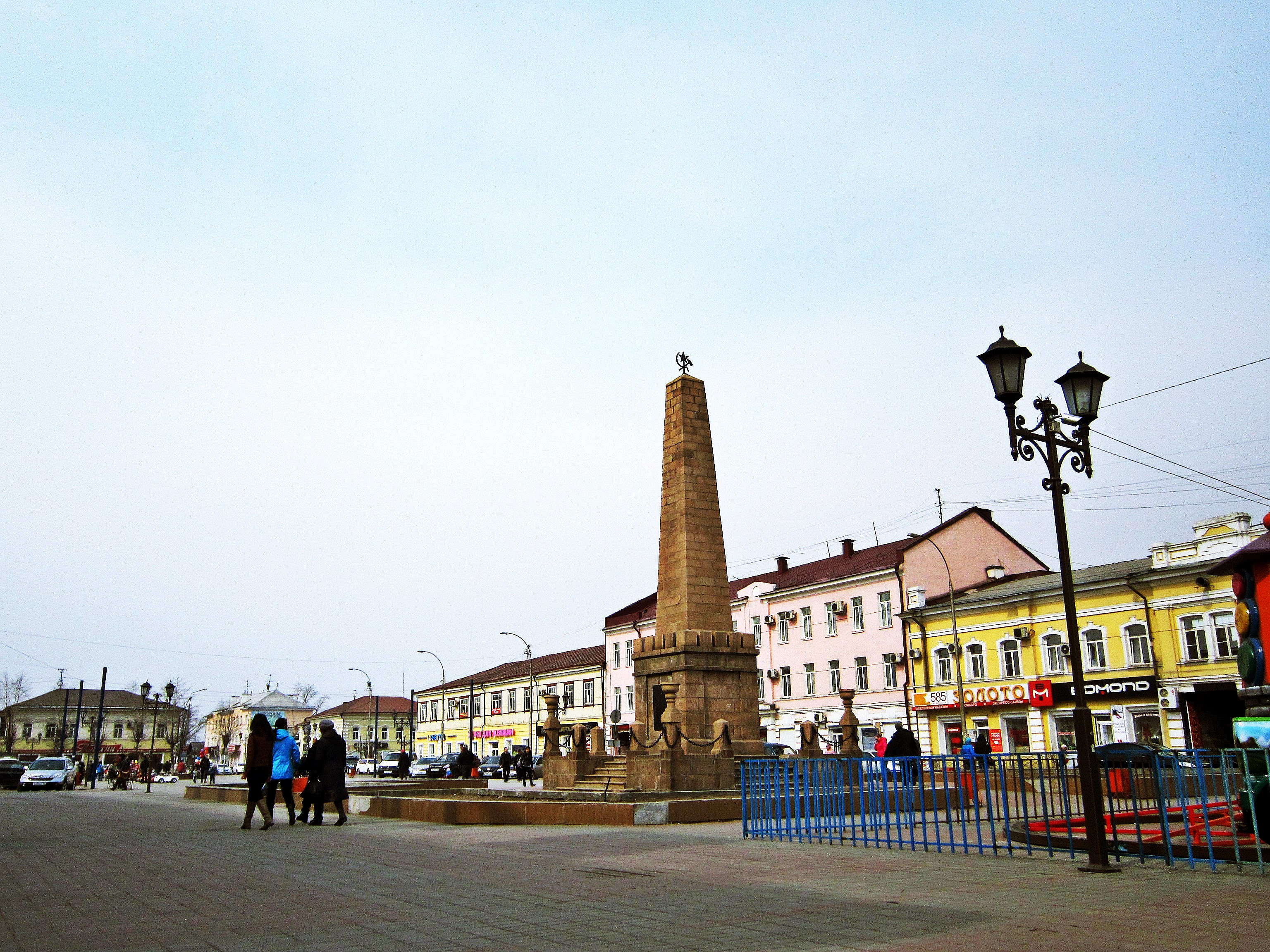 Колонна павшим борцам за коммунизм.